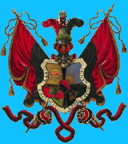 Wappen der Burschenschaft der Bubenreuther